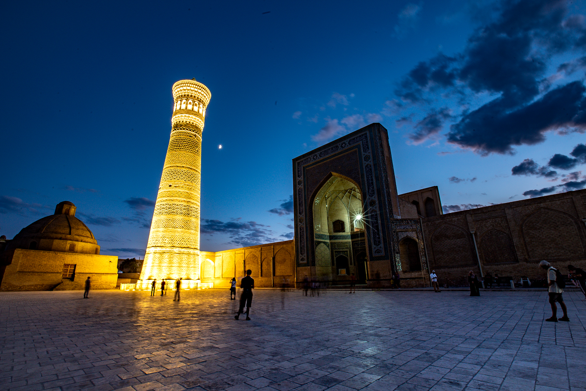 این عکس توسط پوریا افخمی در حاشیه ضبط برنامه تلویزیونی بلور بنفش به کارگردانی بهزاد بلور در شهر بخارا ثبت شده است.